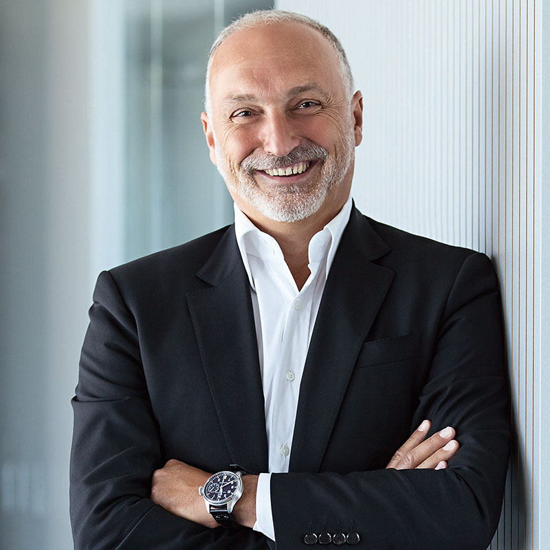 Geschäftsführender Gesellschafter